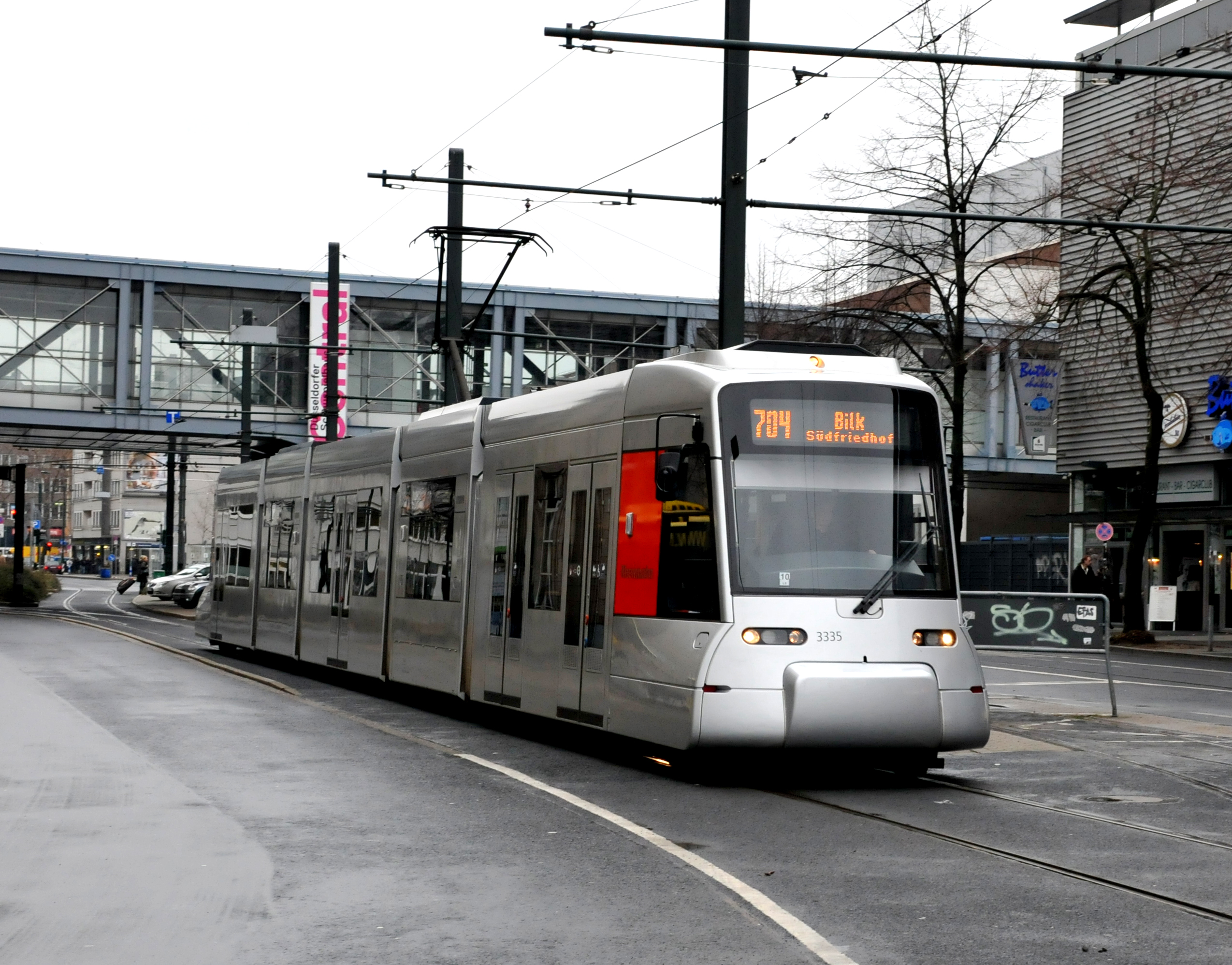 Rheinbahn tram van het type Combino NF 8U nr 3335 te Düsseldorf.